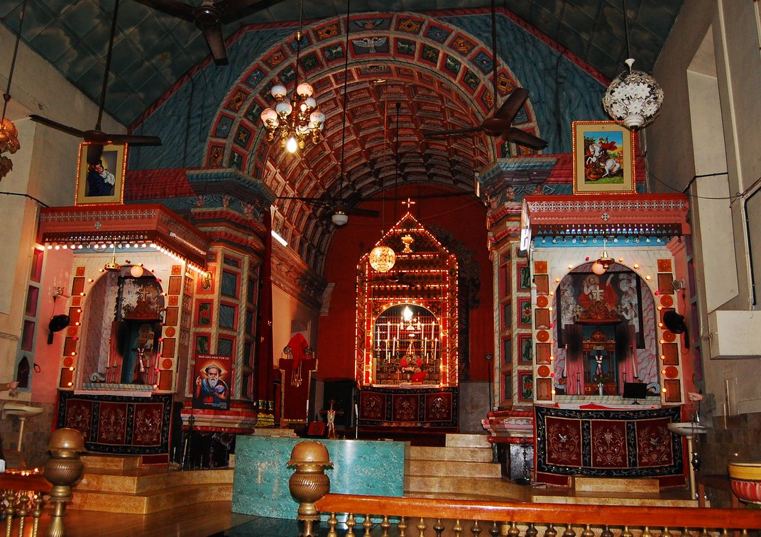 കടമറ്റം‍പള്ളി-അൾത്താര